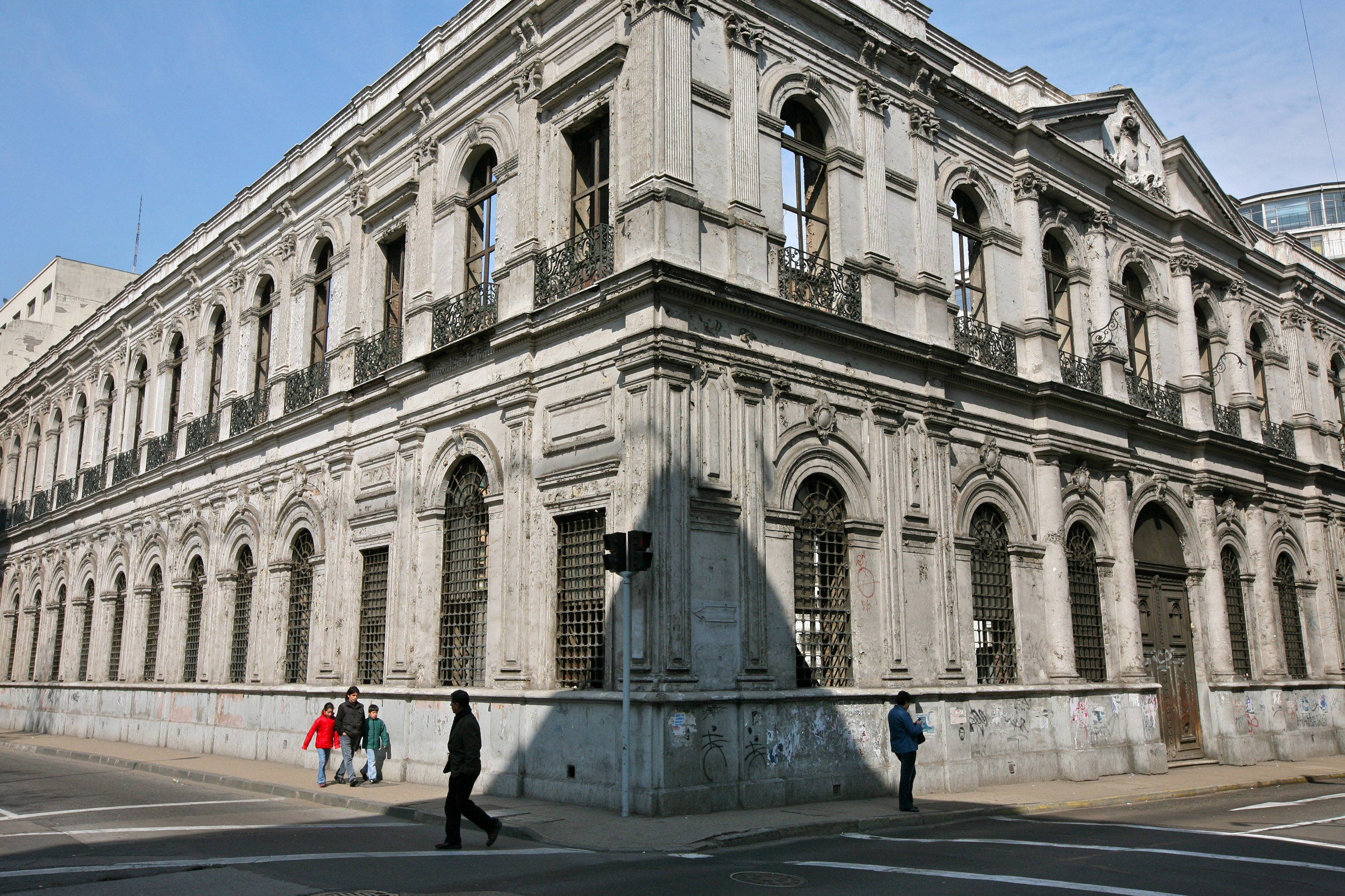 Antiguo edificio del diario "El Mercurio" Santiago, Chile